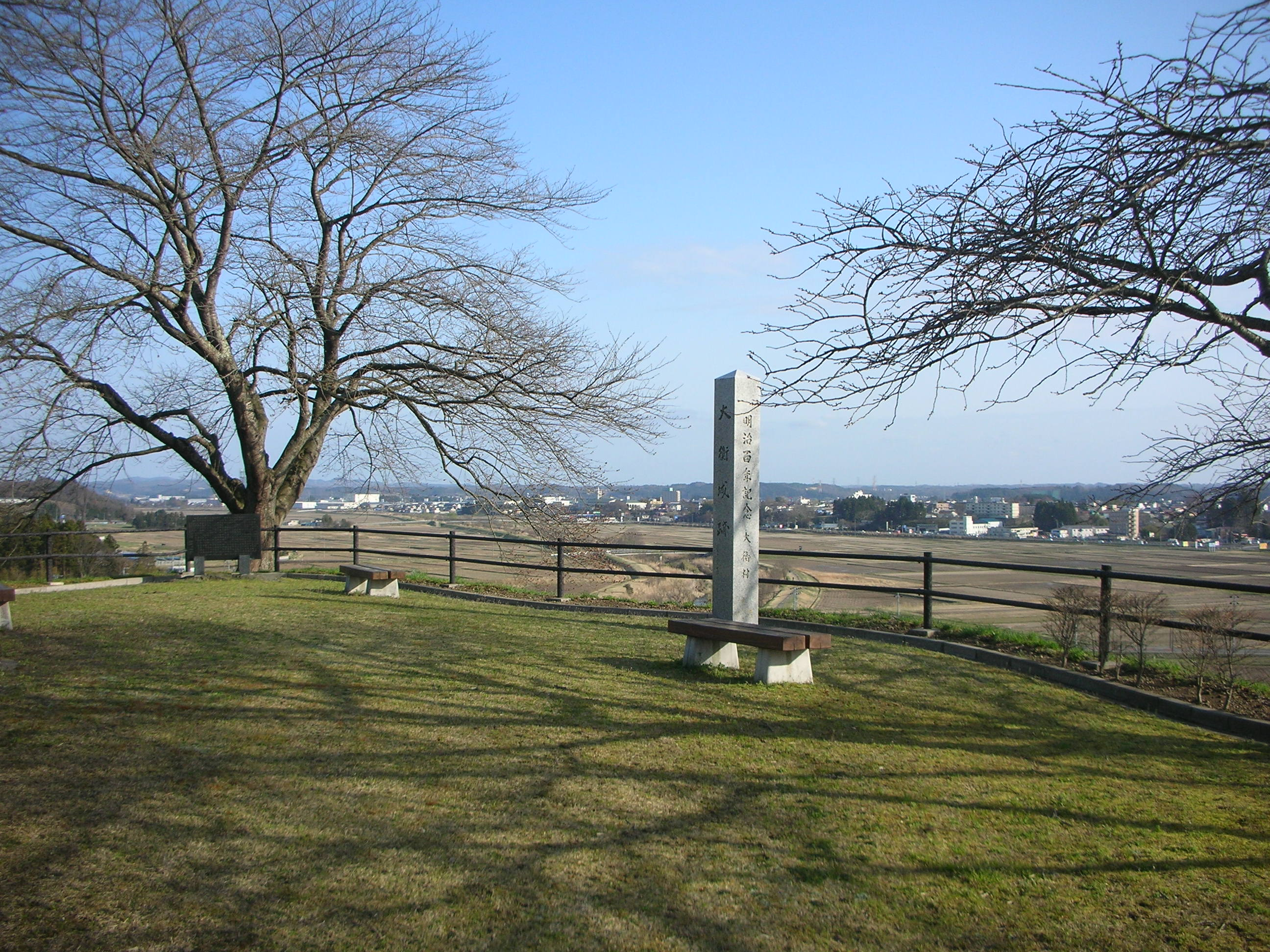 大衡城址公園